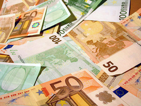 Mga salaping-papel ng euro sa disenyo ni Robert Kalina